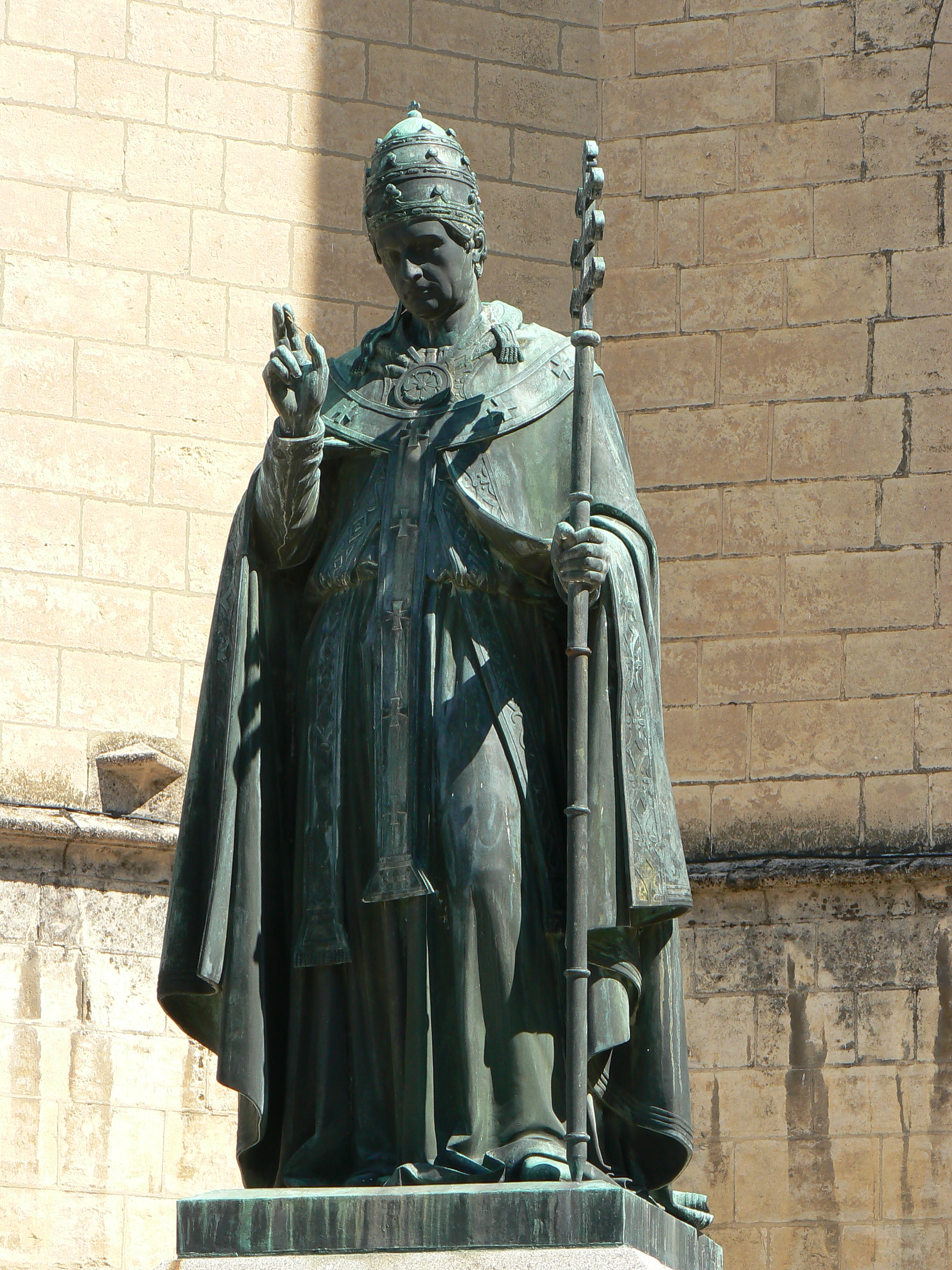 Statue du pape Urbain V à Mende devant la cathédrale Saint-Privat (le socle porte l'inscription “Au bienheureux Urbain V / Pape de 1362 à 1370 / Bienfaiteur du Gévaudan / 28 juin 1874”, cette dernière date correspondant à l'inauguration de la statue)